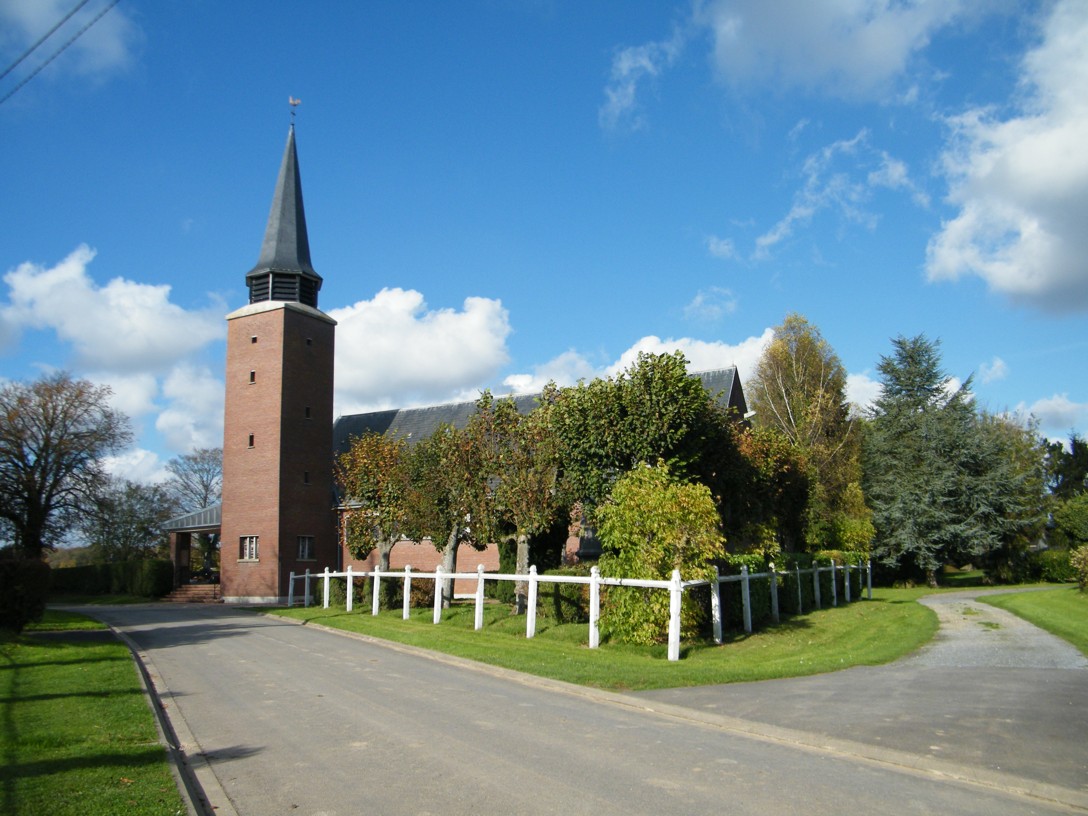 L'église.